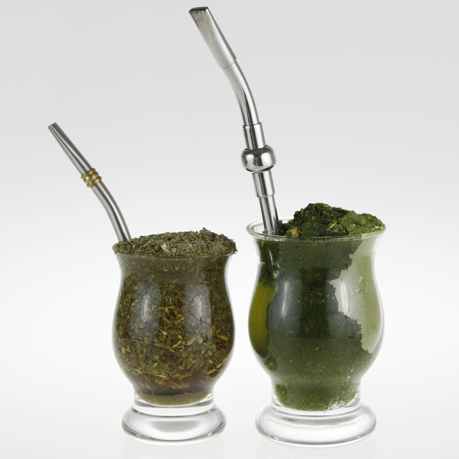 Zdjęcie porównawcze, jak wygląda zaparzona klasyczna Yerba Mate z Argentyny oraz jak wygląda zaparzona erva mate chimarrão z Brazylii.